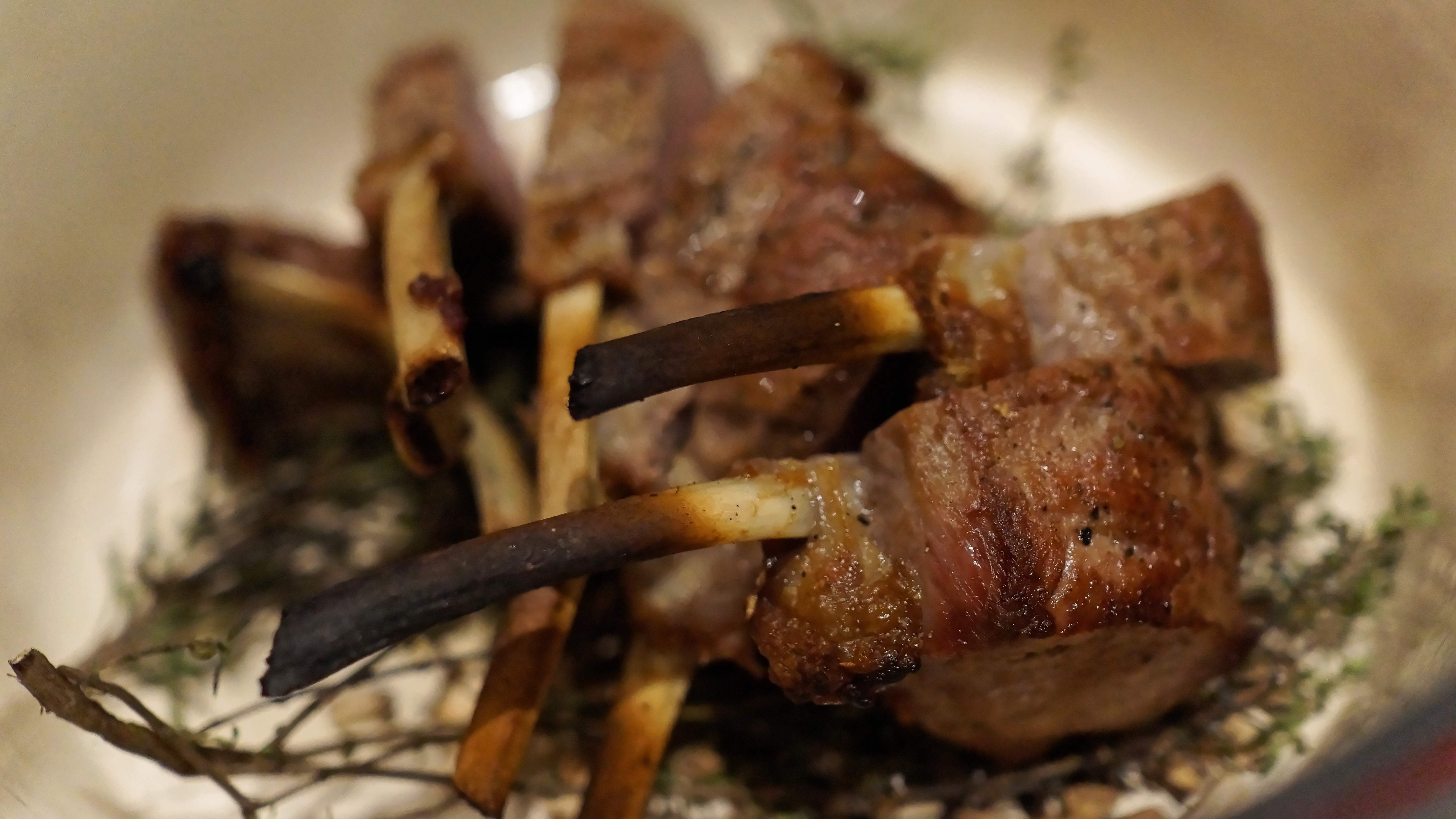 醃過，烤過，再放進 Le Creuset 進燻爐燻過，很搞扛的小羔羊！明明是五分熟，可是那個骨頭都是酥的，好厲害！